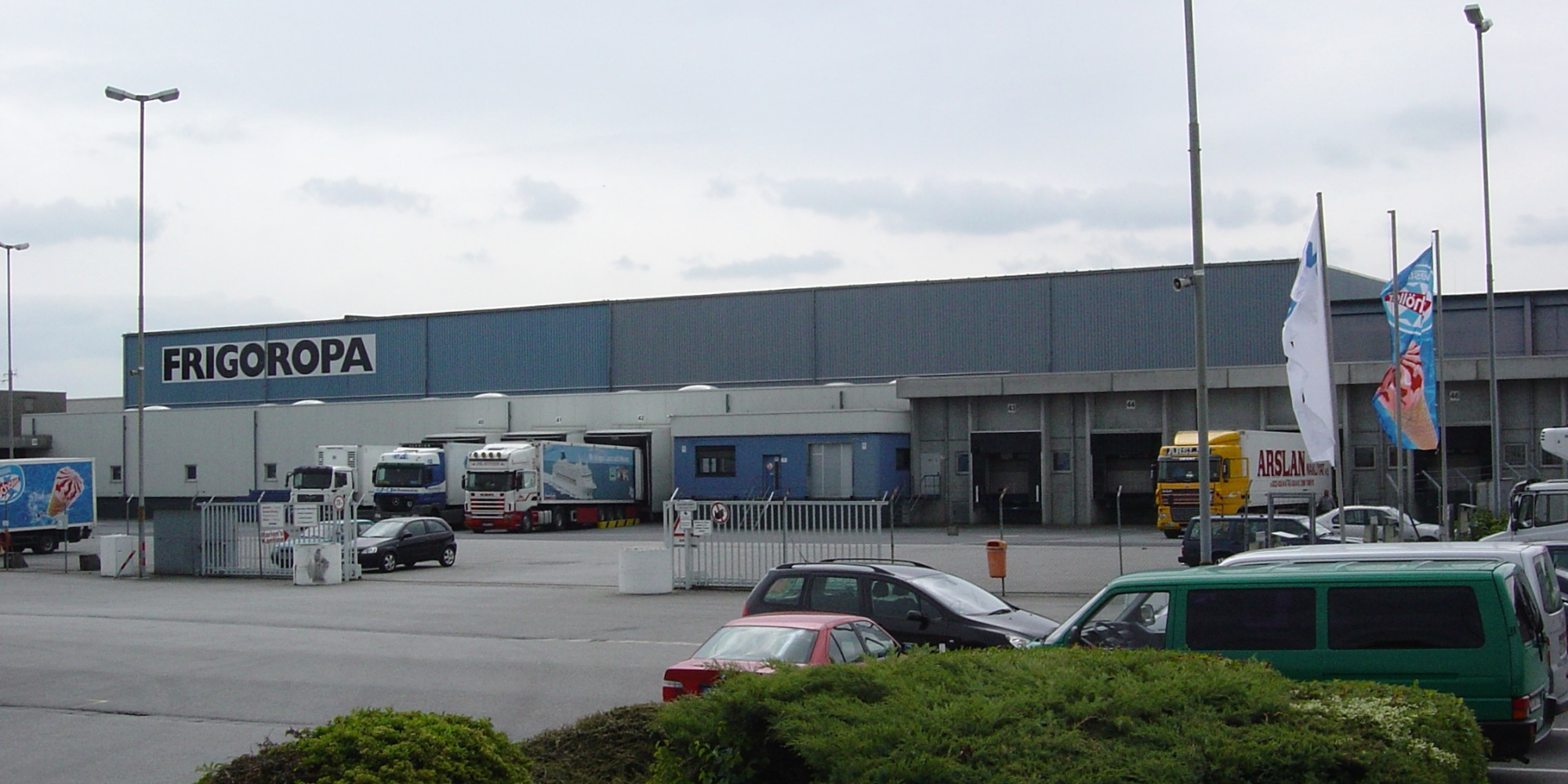 Frigoropa (Nordfrost) Kühlhaus (EK 19), Wasserweg 6, 64521 Groß-Gerau